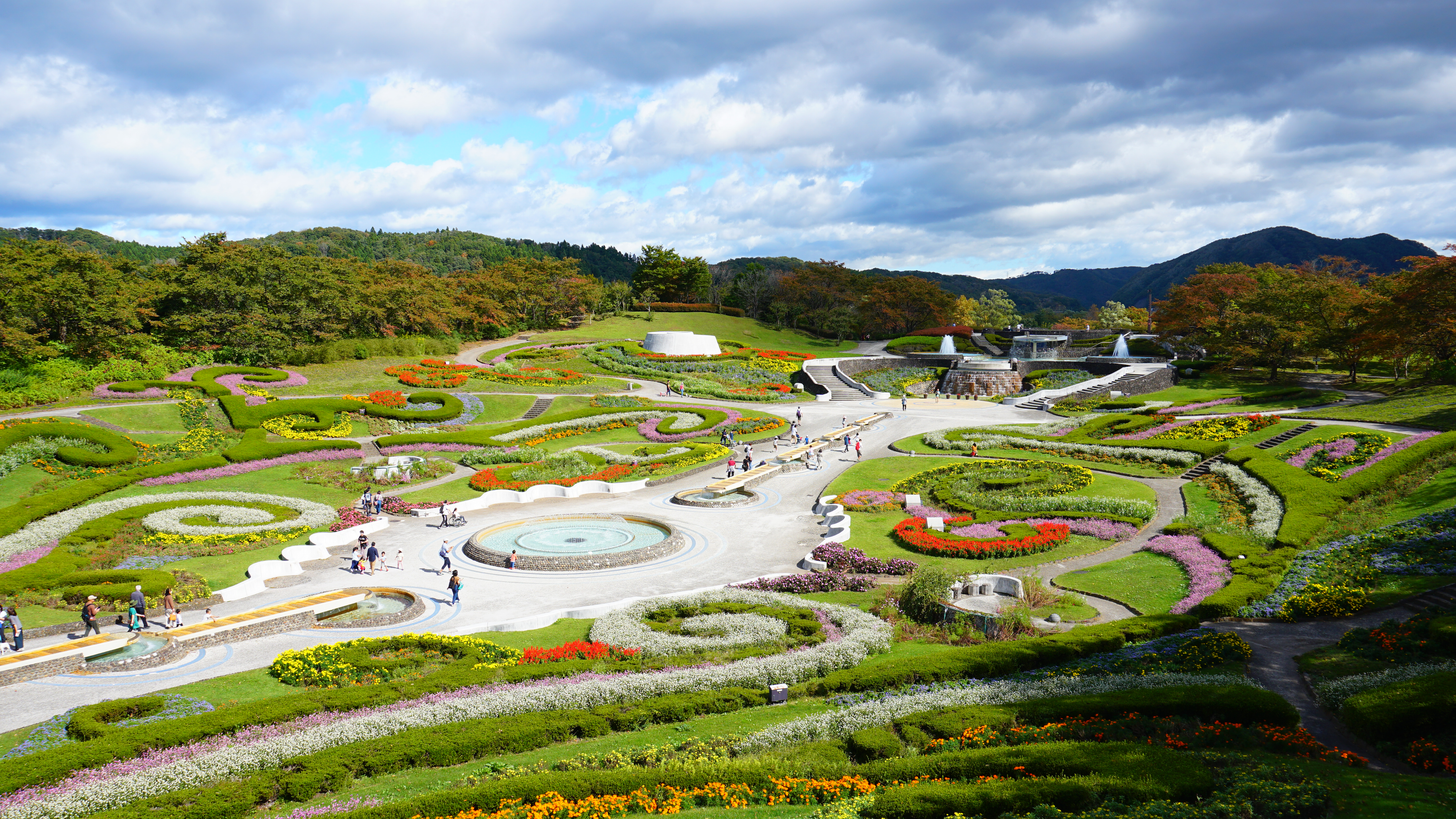 国営みちのくの杜湖畔公園 彩のひろば（宮城県川崎町）